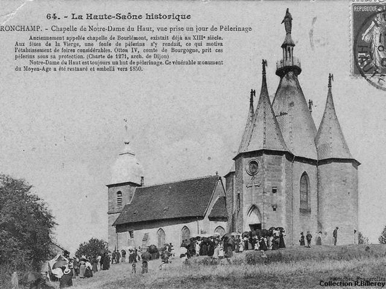 L'ancienne chapelle Notre-Dame-du-Haut à Ronchamp, avec clocher comtois.